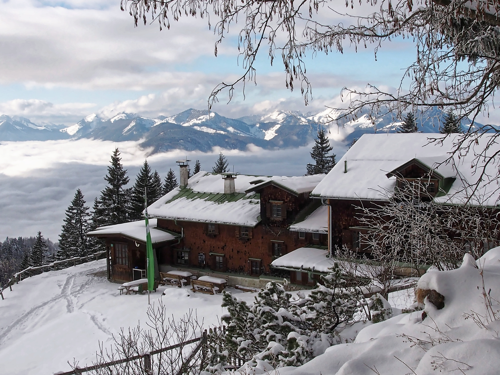 Beschreibung kommt später